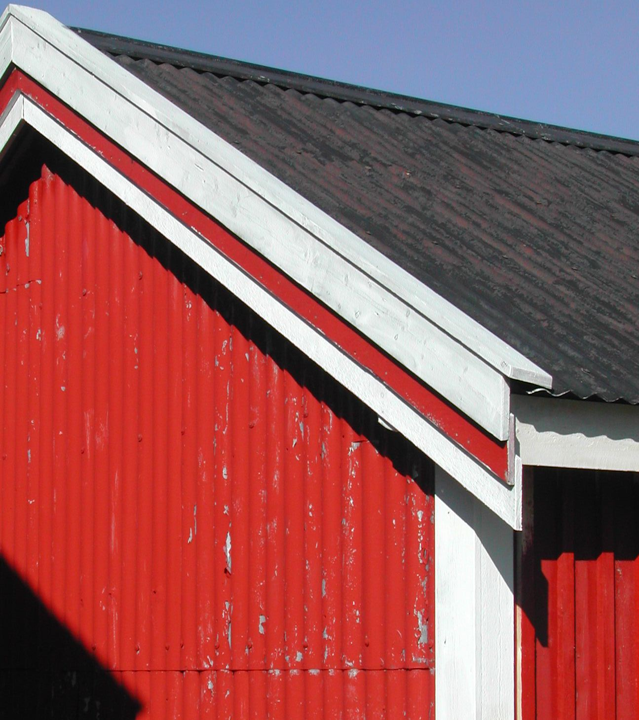 Bølgjeblekk på tak og veggar